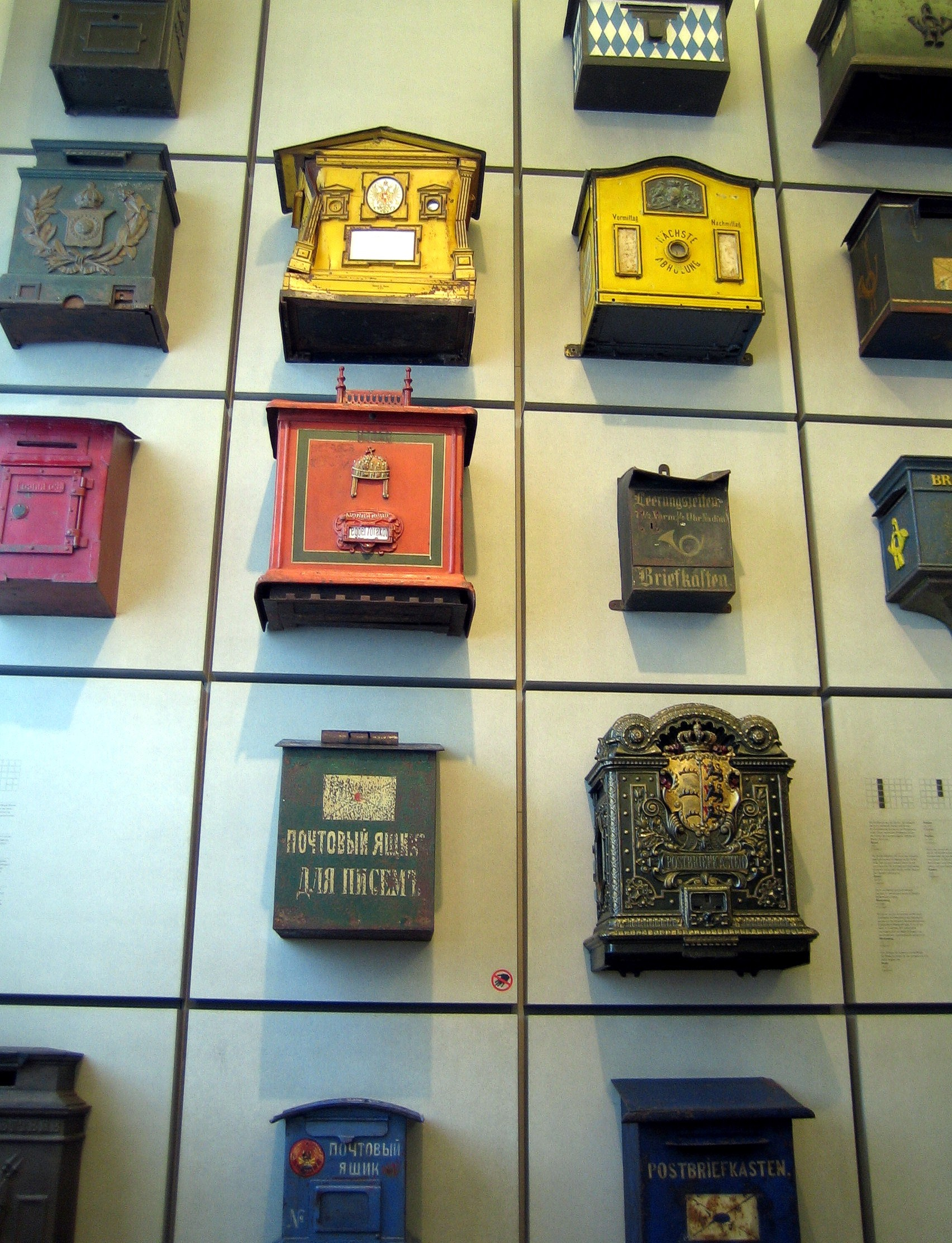 Museum für Kommunikation in Berlin. Ausstellungsobjekte Briefkästen.